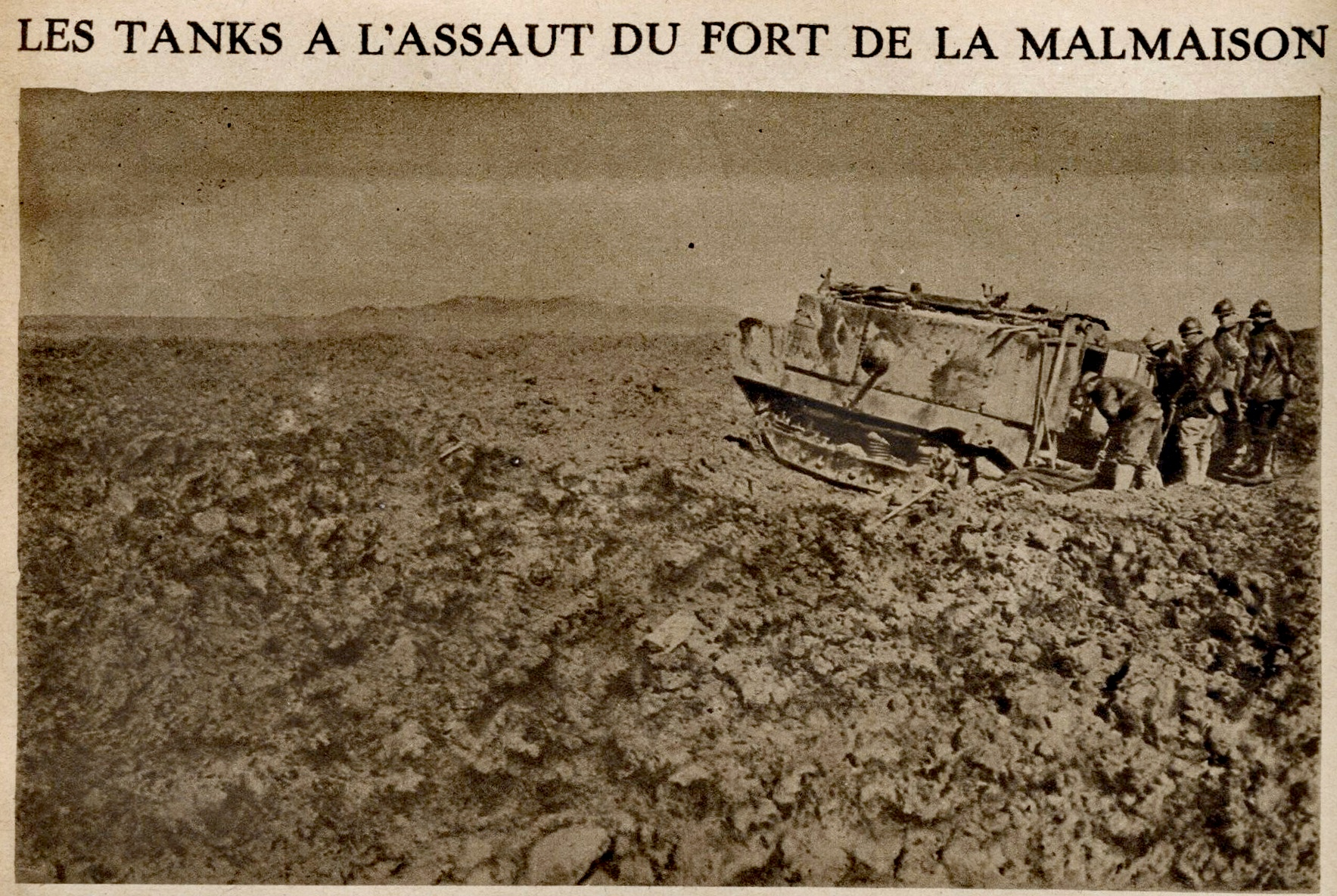 Char français Schneider à la bataille de la Malmaison, entre le 23 et le 25 octobre 1917. Photographie publiée par l'hebdomadaire Le Miroir (n° 208) le 18 novembre 1917.